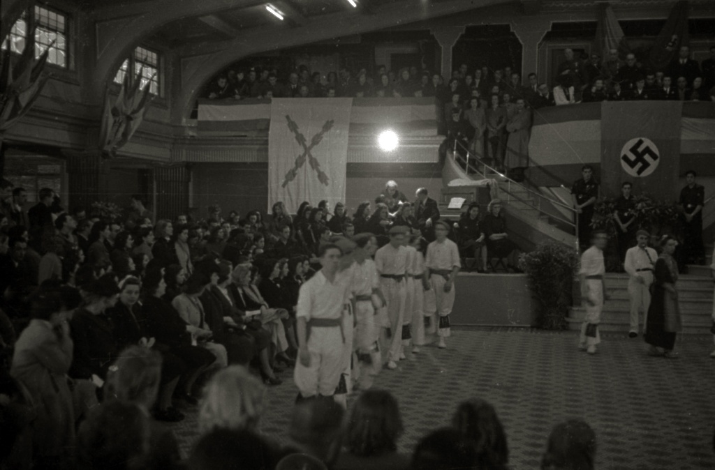 Título original: Acto de la Falange celebrado en un salón de La Perla del Océano (3/3) Localización: San Sebastián (Guipúzcoa)